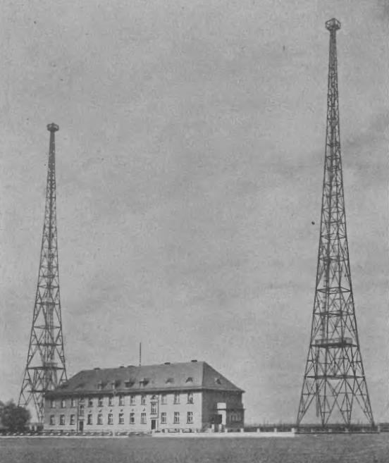 Der Oberschlesische Sender in Gleiwitz